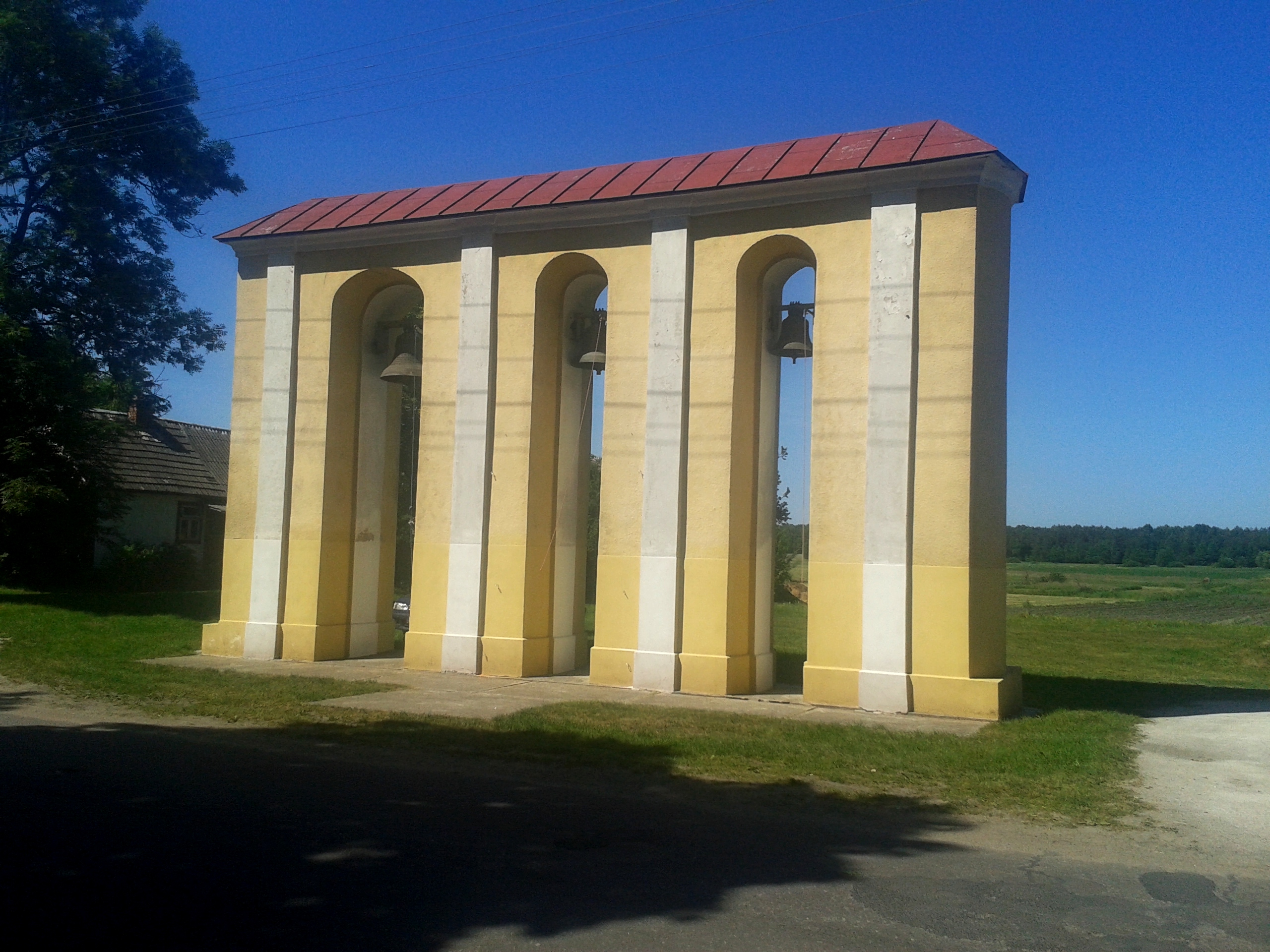 Dzwonnica przy kościele w Motwicy